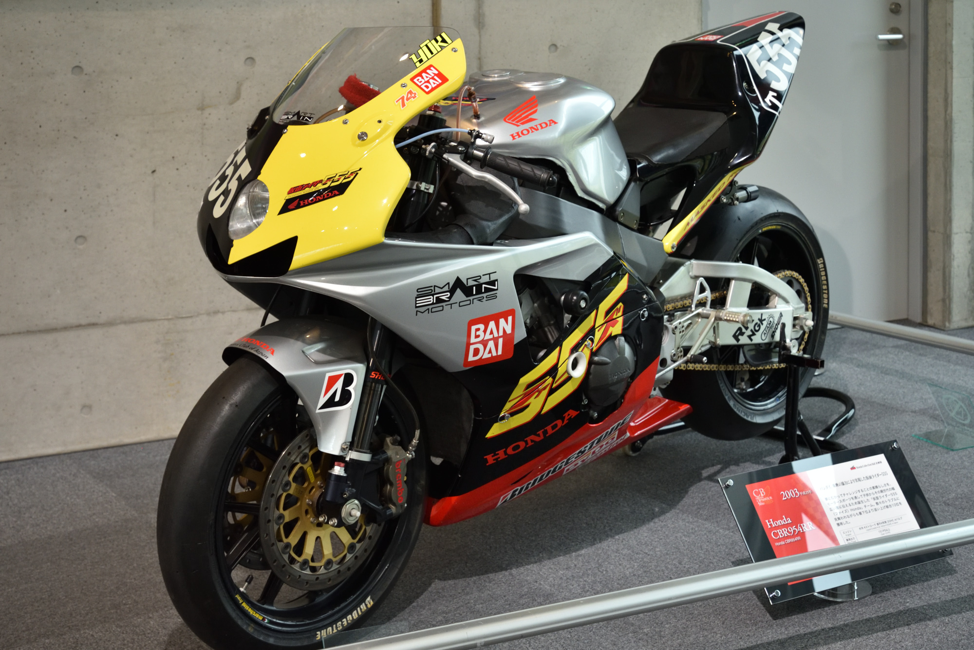 2003年の鈴鹿8時間耐久レースに出場した仮面ライダー555ホンダチーム（山口辰也/高橋裕紀）のマシン